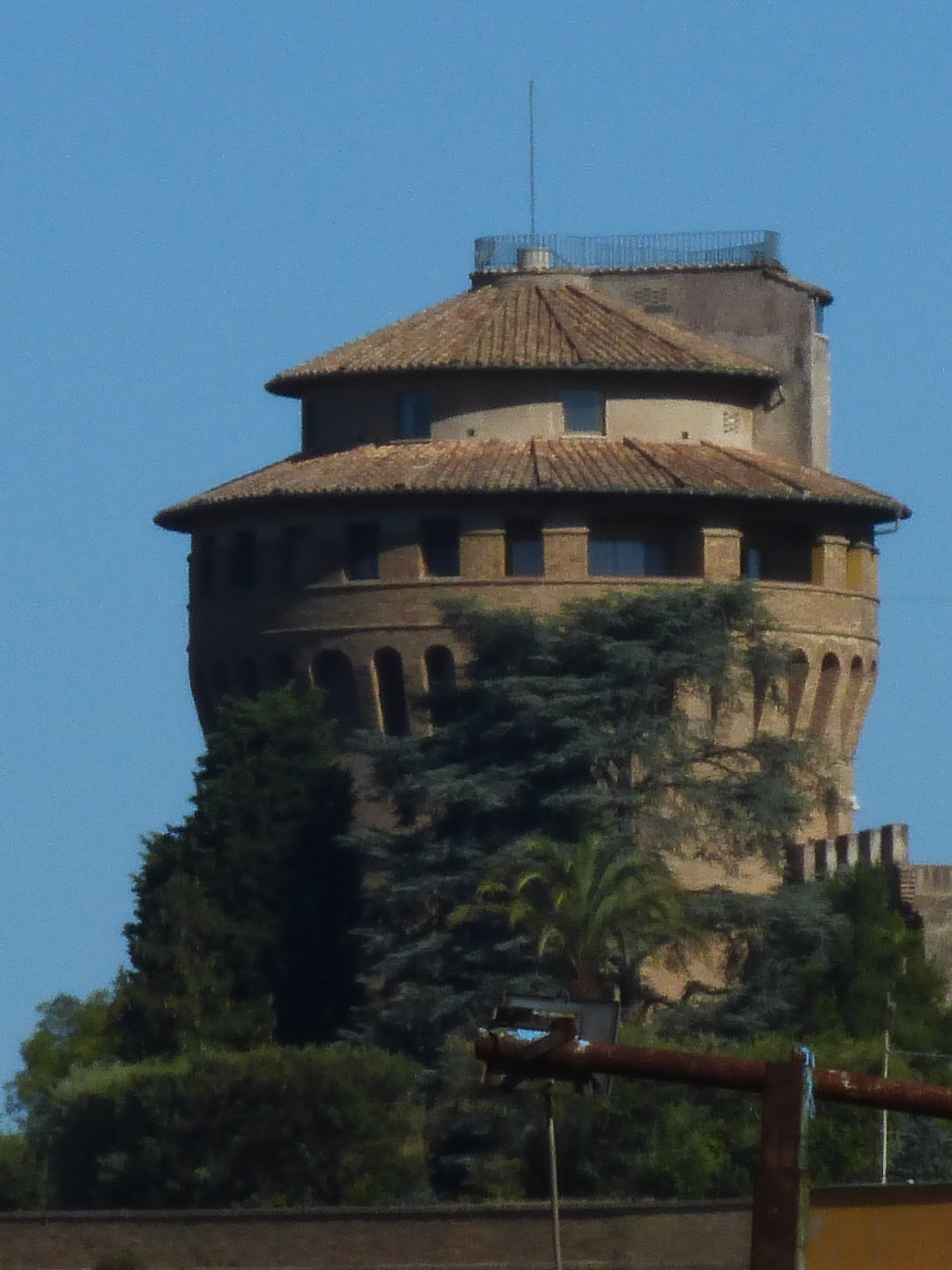 Roma, Torre di S. Giovanni nelle mura Vaticane, dalla stazione di S. Pietro